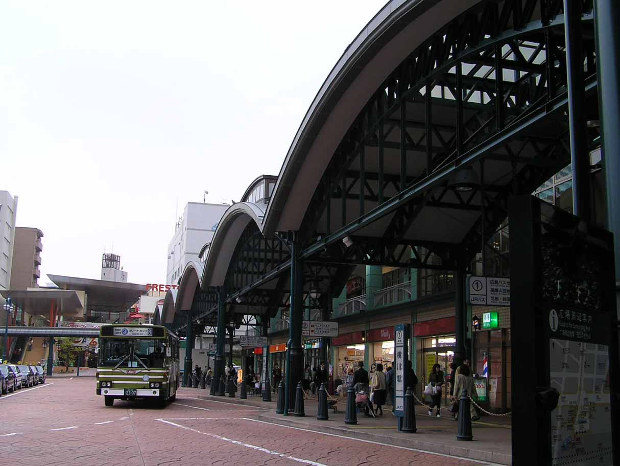 yokogawa station 2